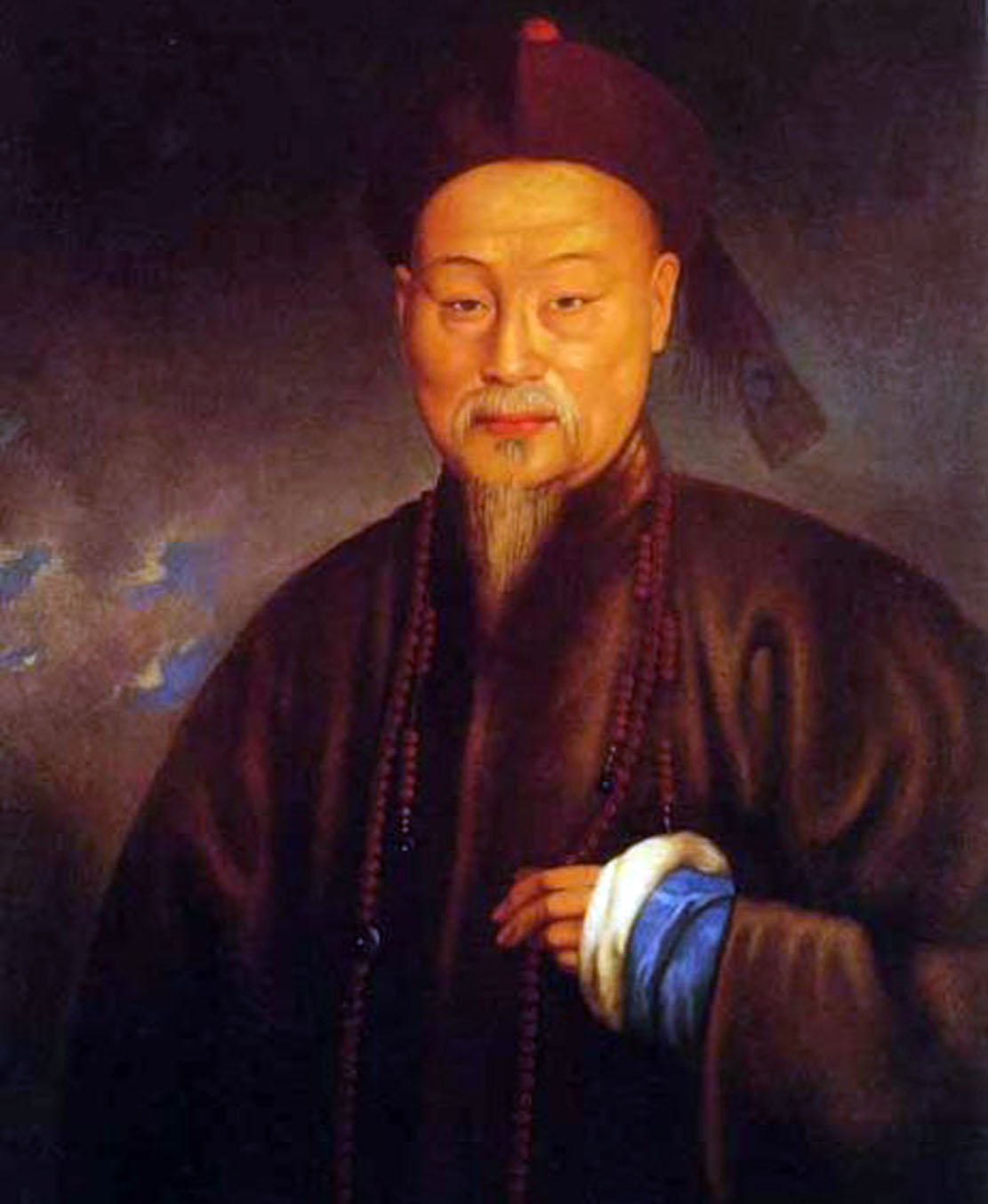 Lin Zexu (1785—1851)